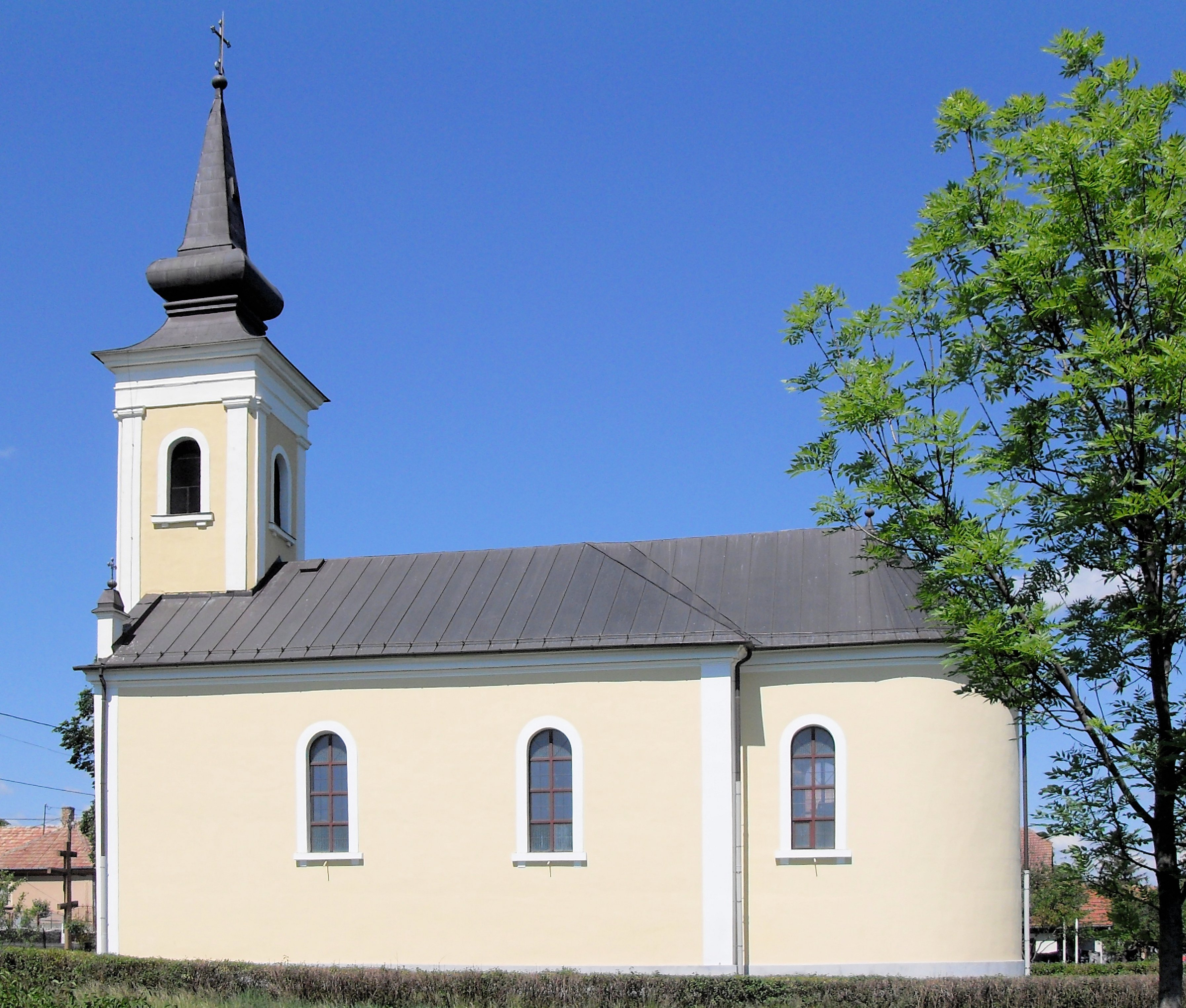 Görög katolikus templom Csobád